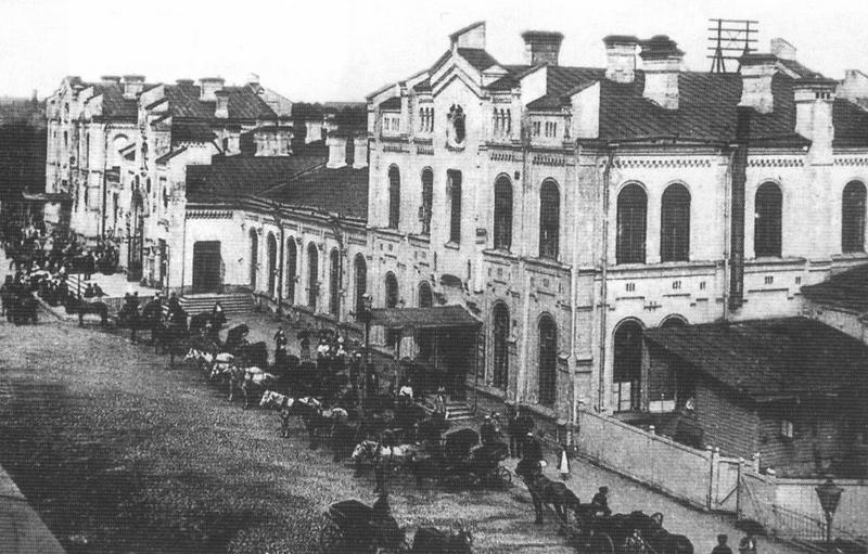 Гельсингфорсский монетный двор 1863-1917